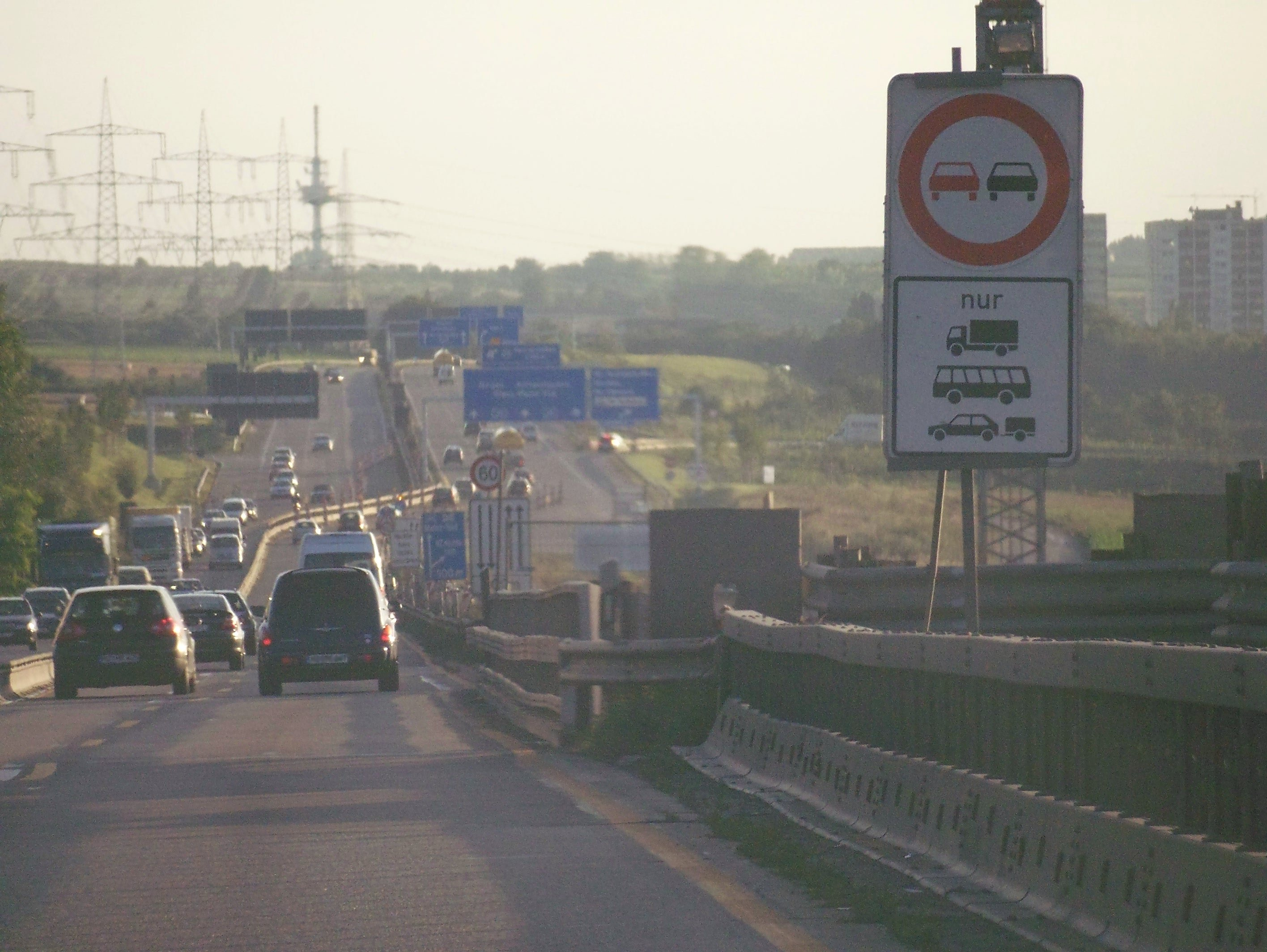 Bundesautobahn A60 Mainz